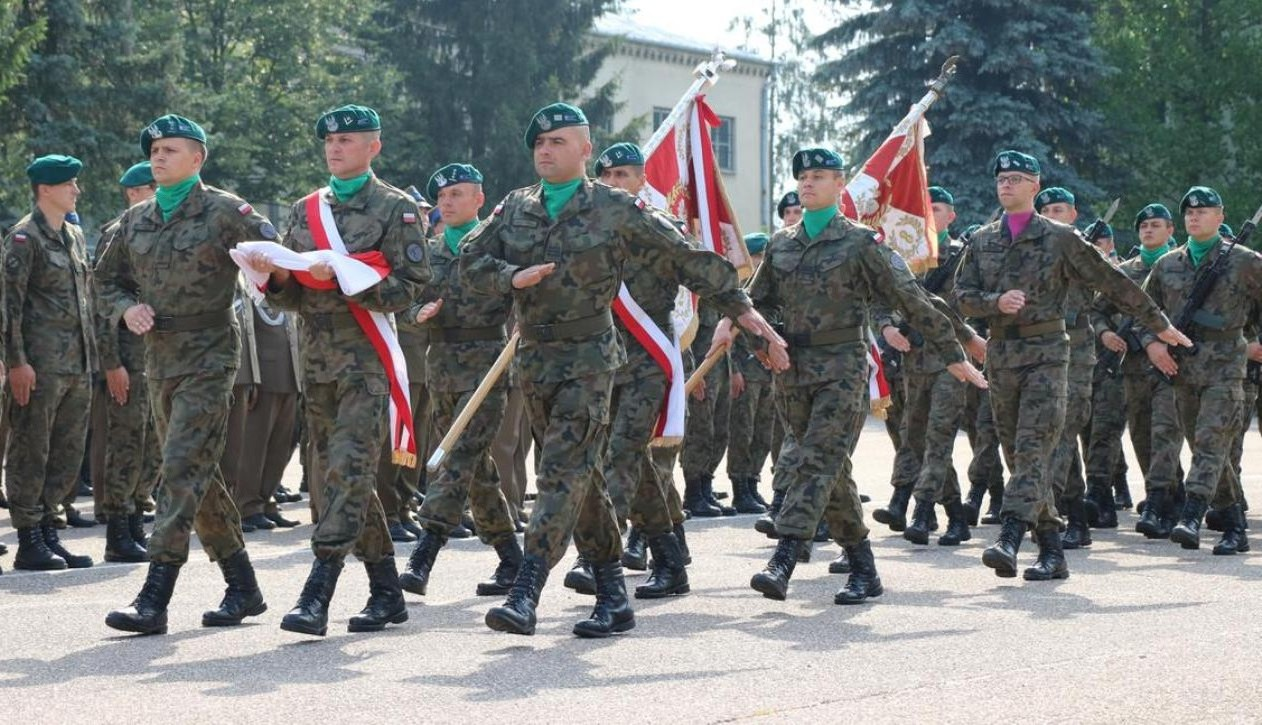 Garnizon Przasnysz, 01.07.2019. Uroczystość z okazji objęcia obowiązków dowódcy 2ORel